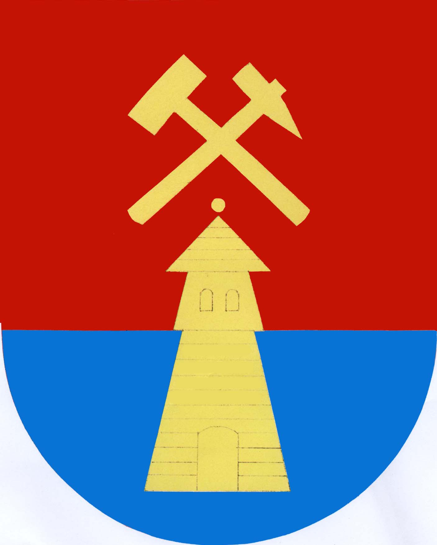 znak obce Suchovršice